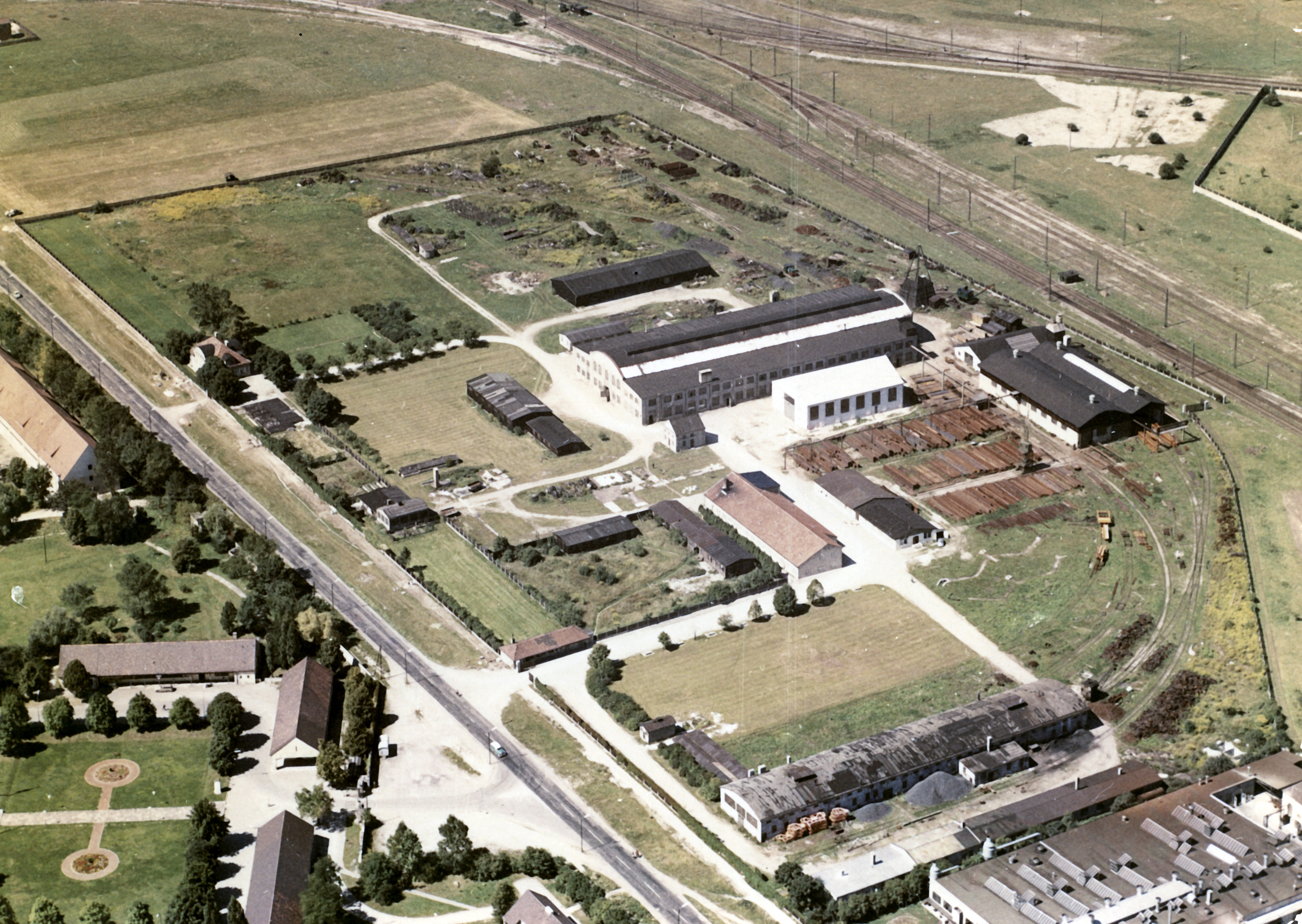 Luftaufnahme Betriebsgelände Maurer SE München, Aufnahmedatum unbekannt